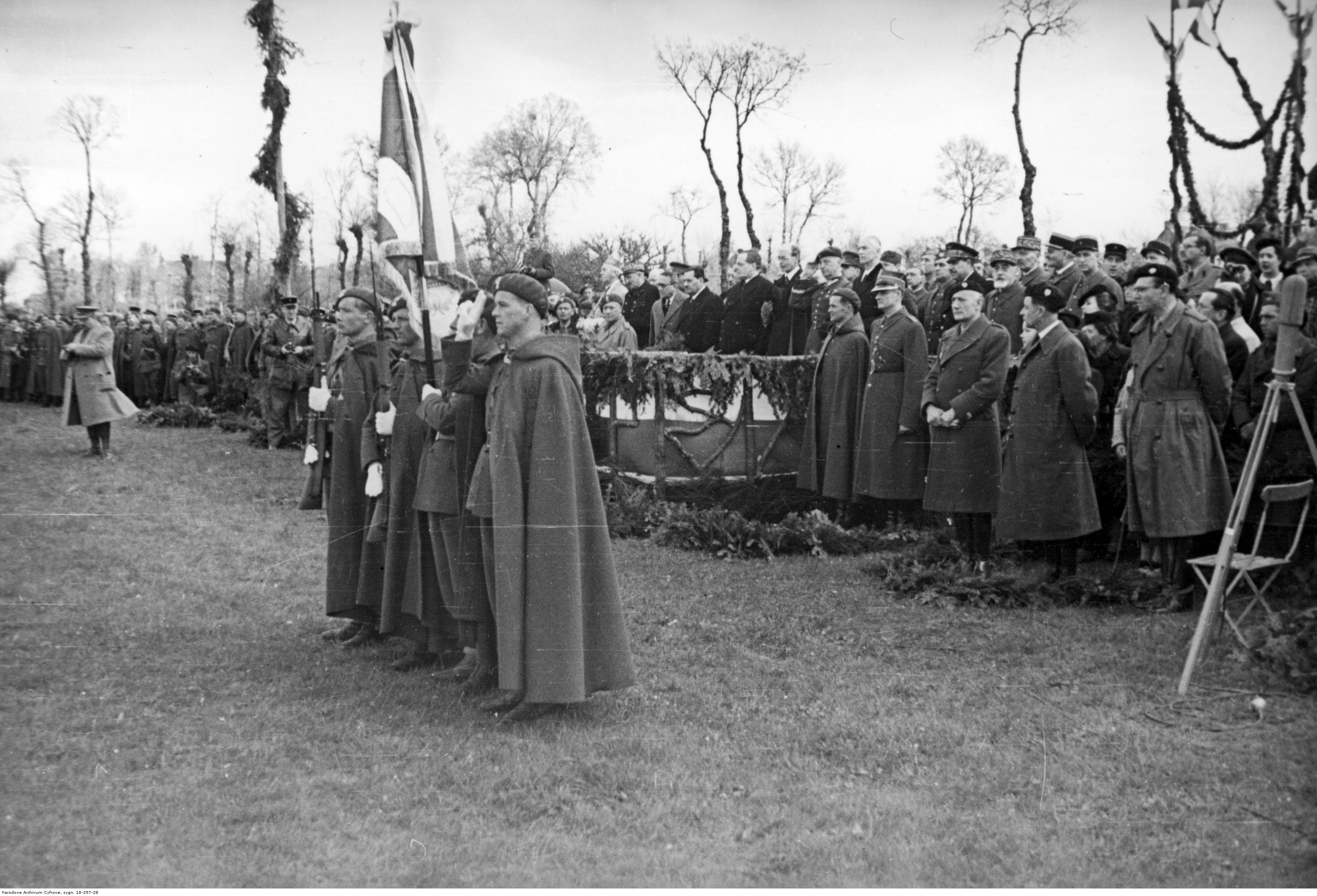 Uroczystość wręczenia sztandaru Samodzielnej Brygadzie Strzelców Podhalańskich - fragment uroczystości; Malestroit, 10 kwiecień 1940 r. Na pierwszym planie poczet sztandarowy. Widoczni także m.in.: prezydent RP Władysław Raczkiewicz, gen. Władysław Sikorski, mjr Jerzy Borkowski, ambasador Leon Noel, ambasador Howard Kennard, gen. L. Faury, gen. V. Denain. Archiwum Fotograficzne Czesława Datki. Sygnatura: 18-257-28